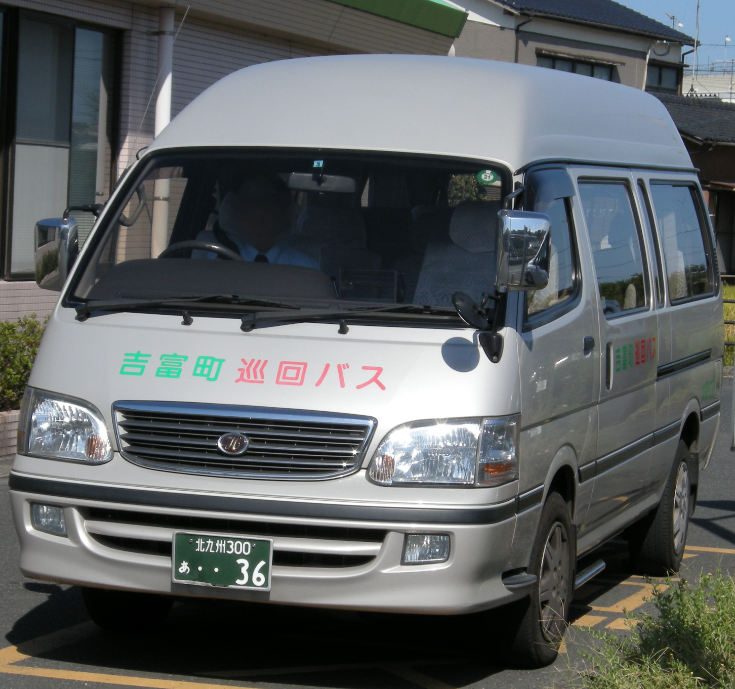 宇島太陽交通 吉富町巡回バスの車両